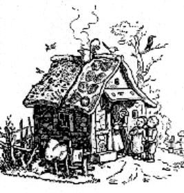 Hänsel und Gretel Zeichnung von Adrian Ludwig Richter (1803-1884)